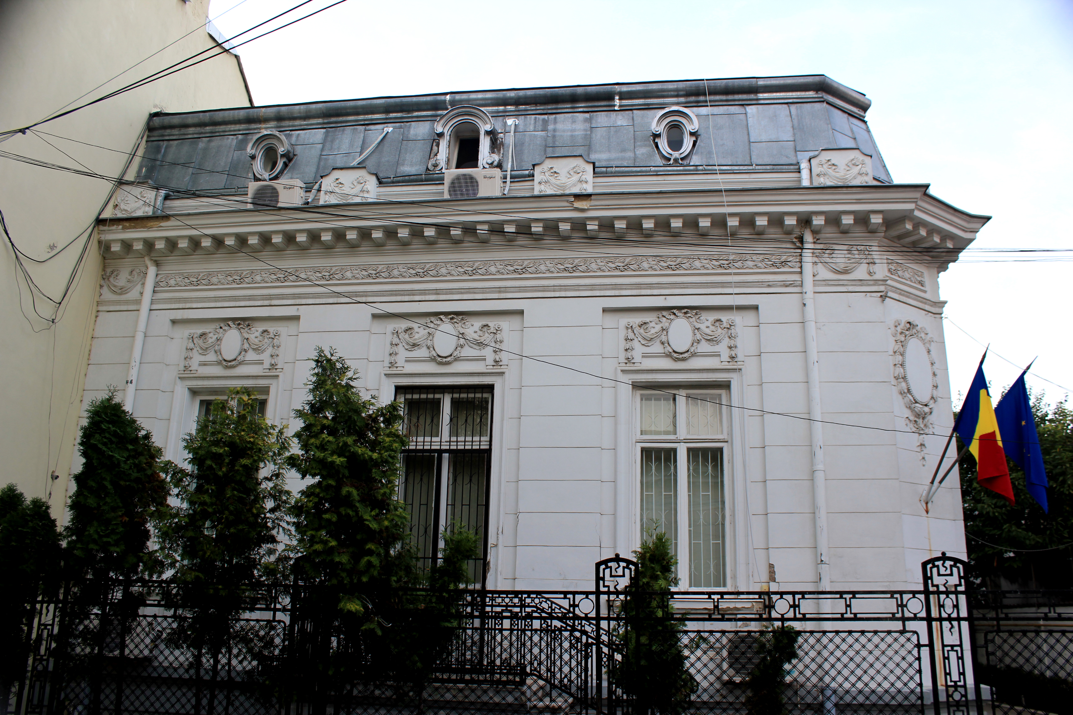 Casa Romano Alexandru 19